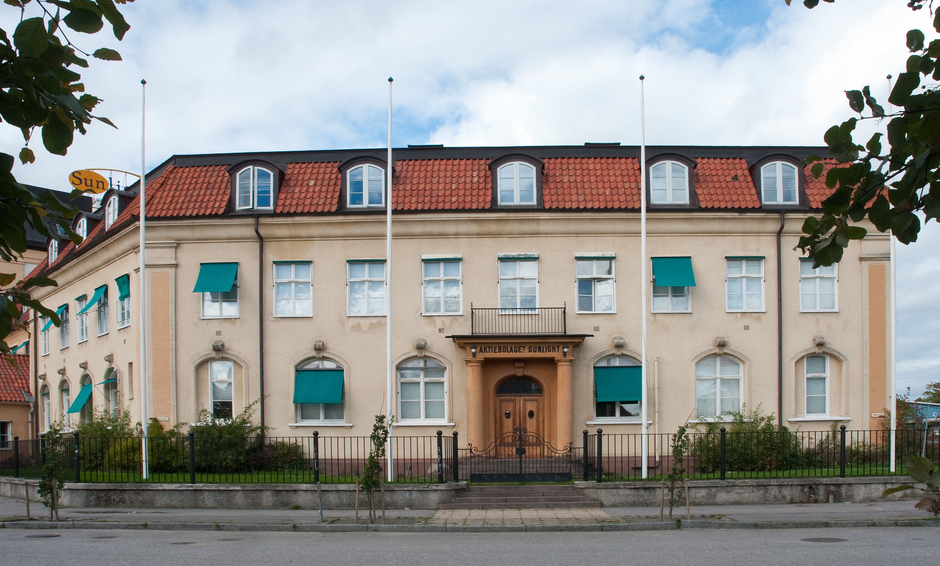 Aktiebolaget Sunlight gamla kontor